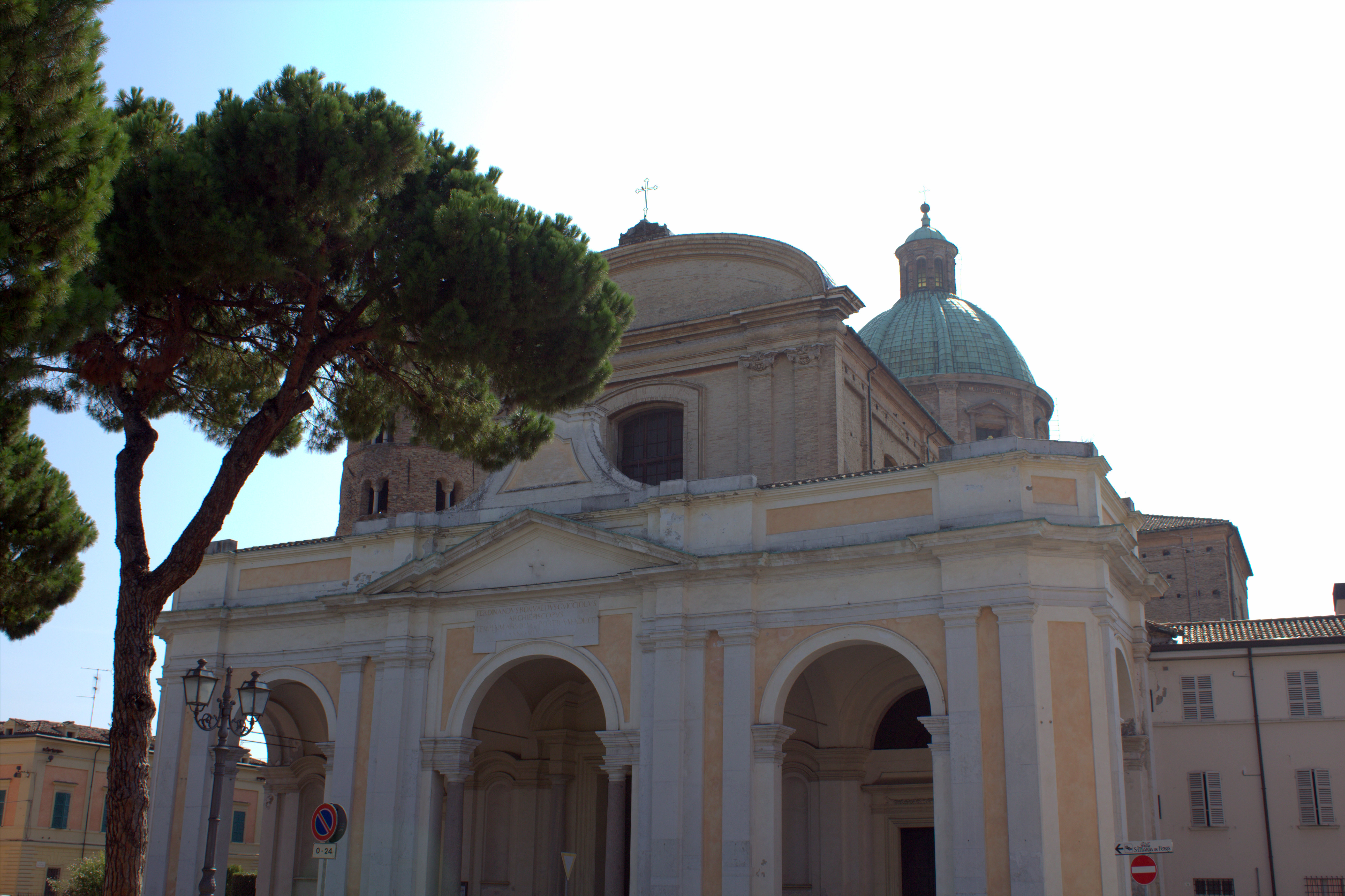 Esterno del Duomo di Ravenna